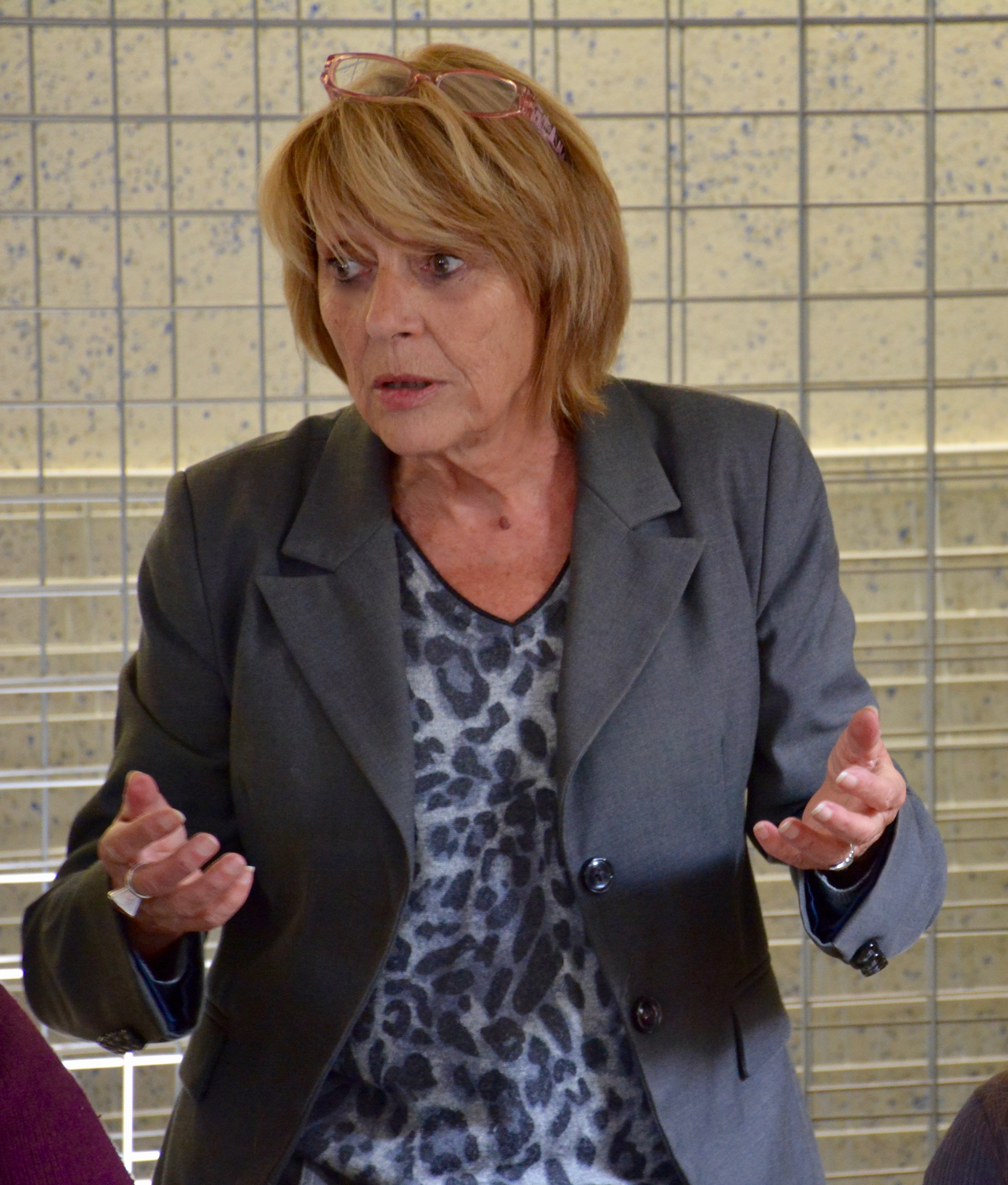 Photo de Monique Vuaillat prise pendant le séminaire de Grenoble "Les Migrations, Parlons-en" le 2 novembre 2016.